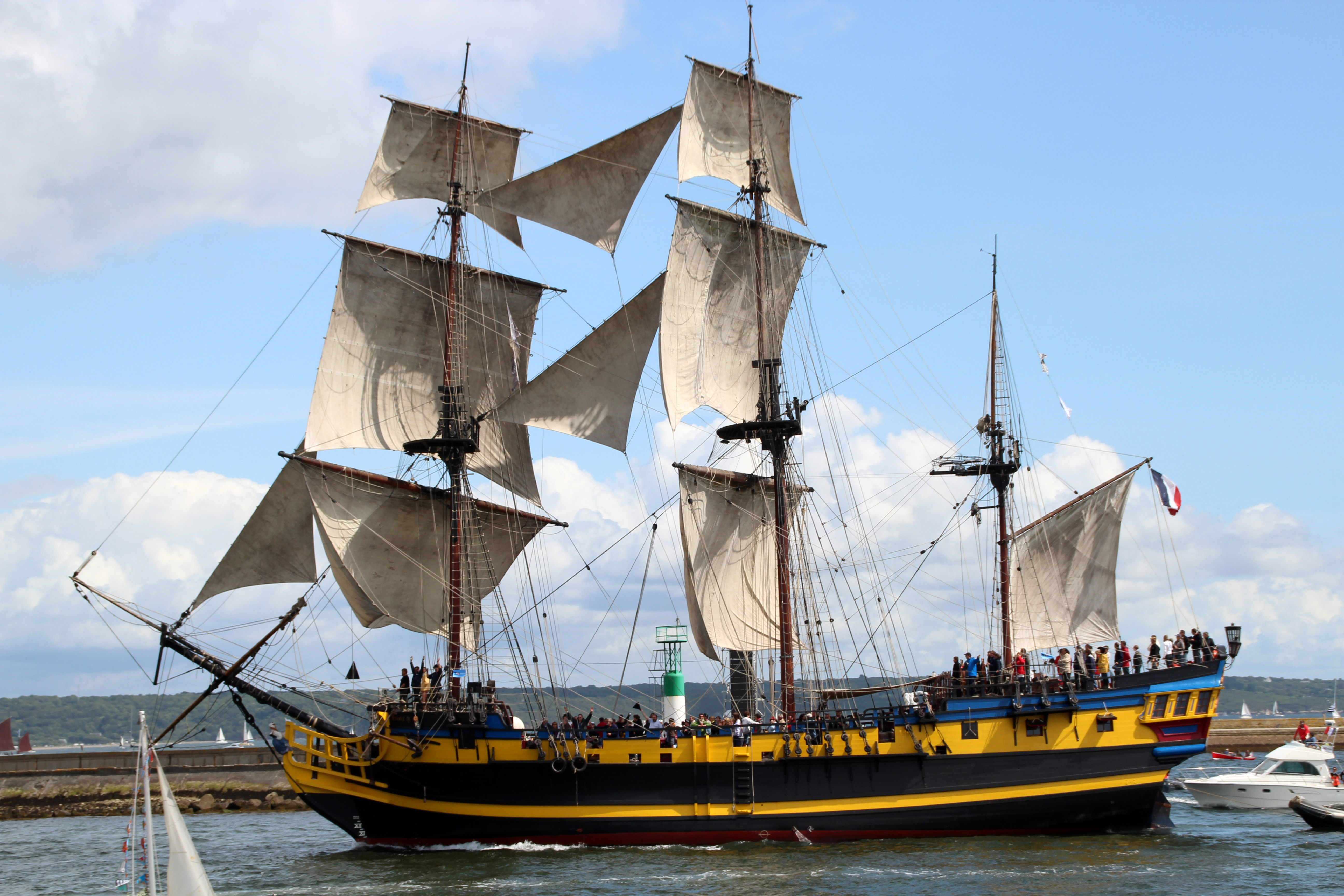 Etoile du Roy sous voile